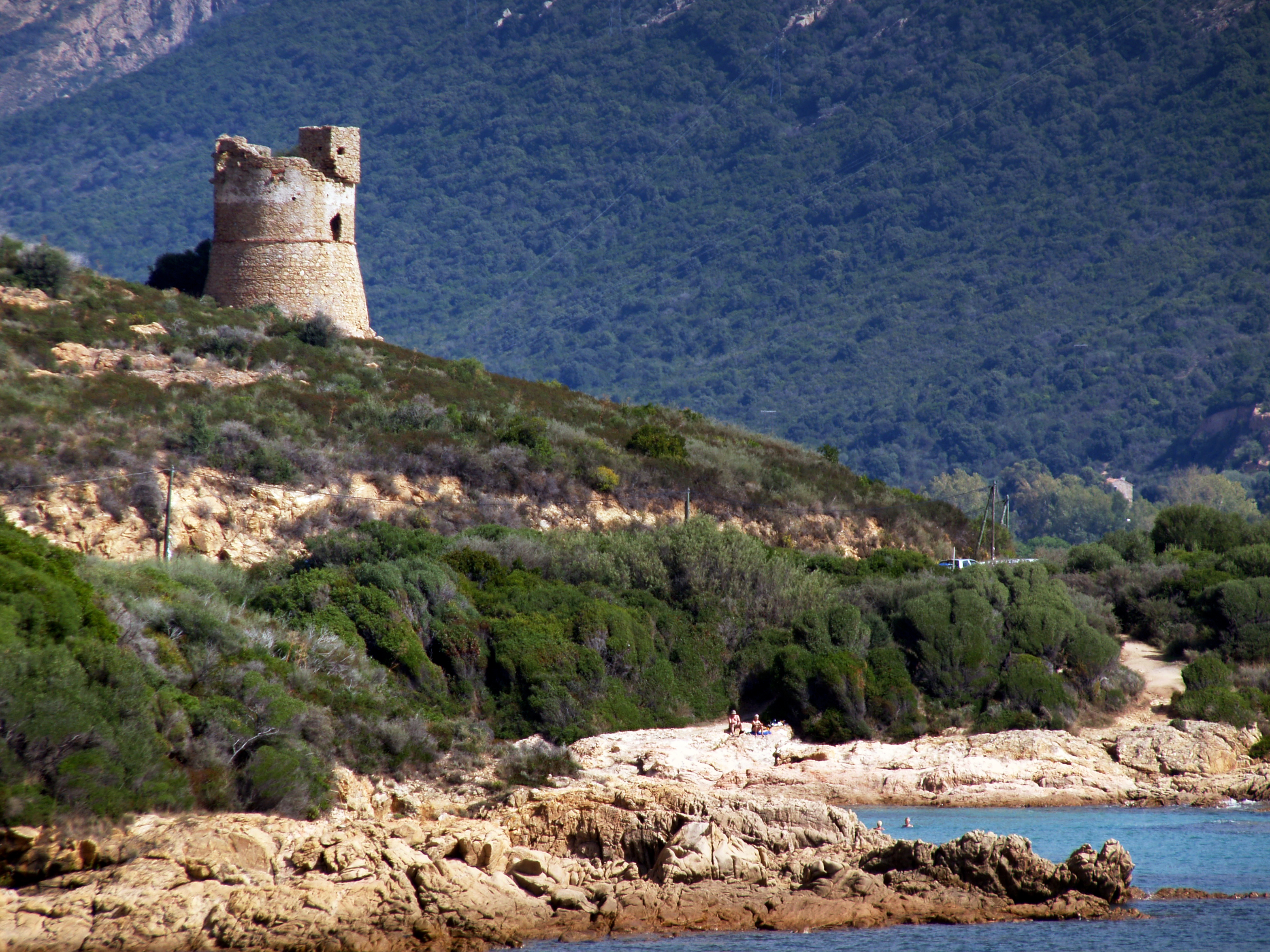 Vico (Corse) - Tour génoise de Sagone